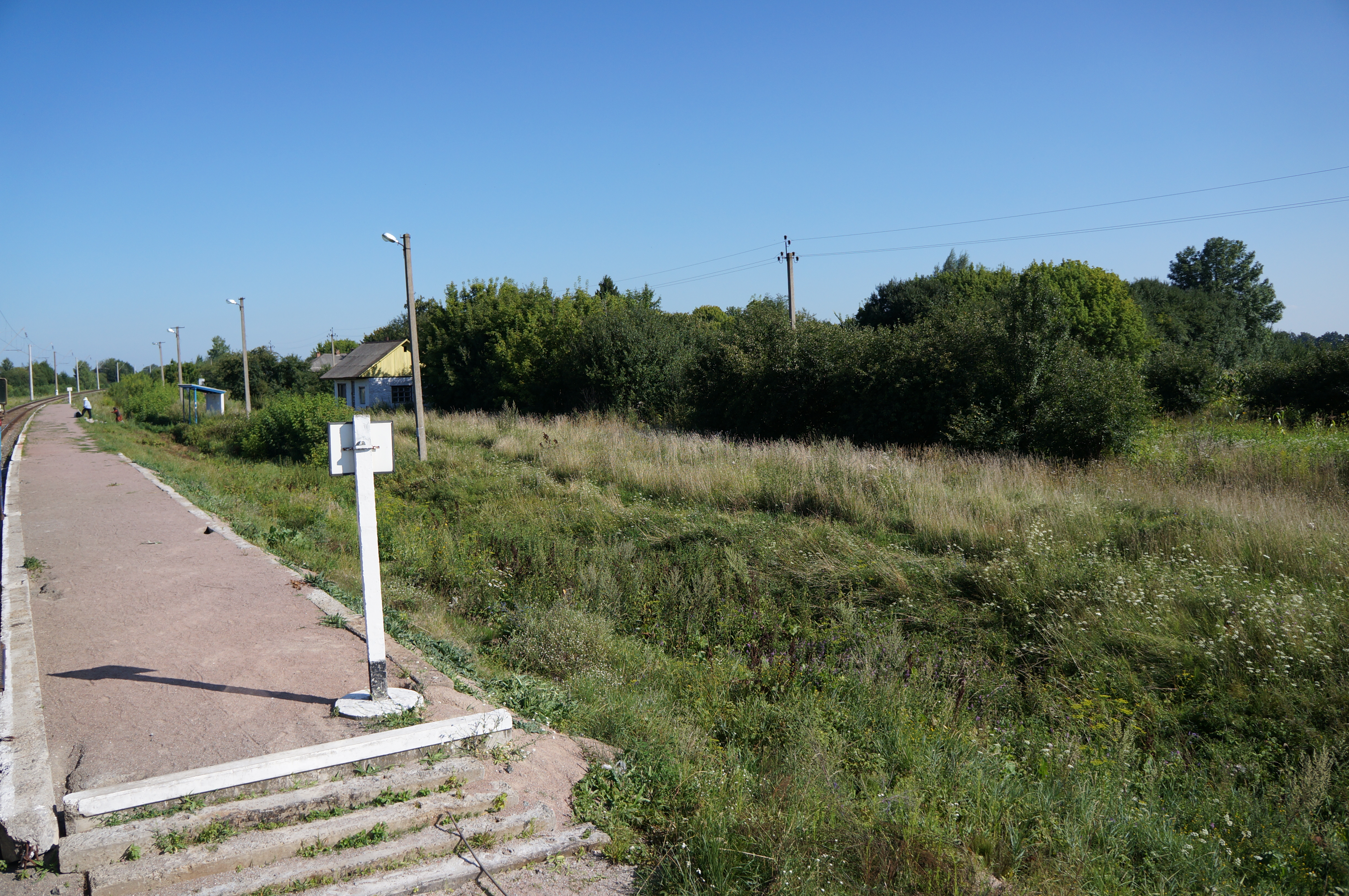 Залізнична платформа 82 км